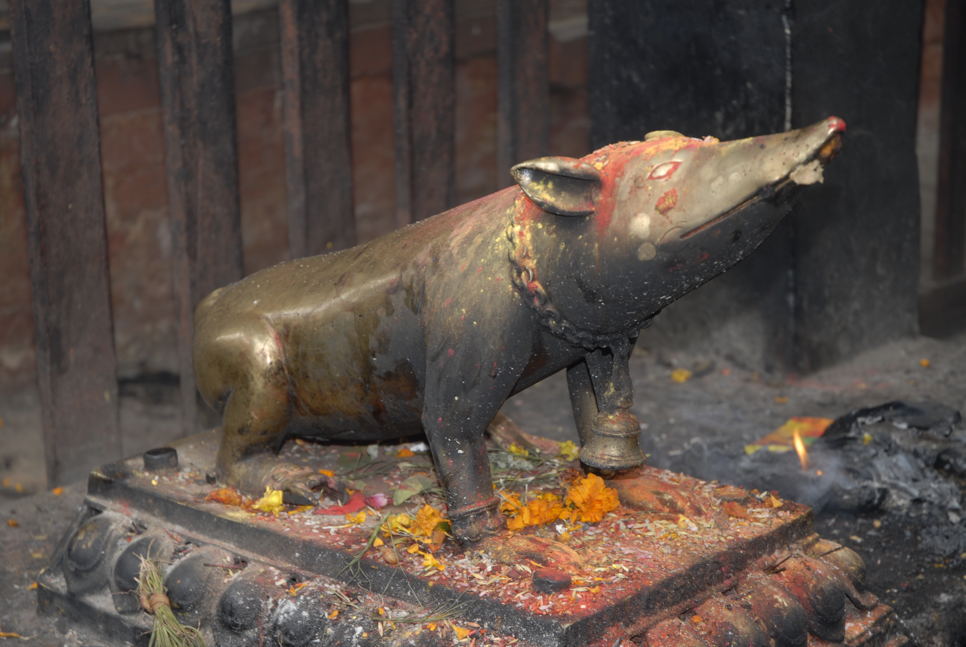 Statue de Mushika devant le temple d'Ashok Binayak à Katmandu, près de Durbar Square